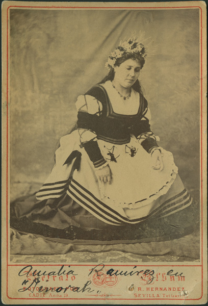 Cabinet. Amalia Ramírez en Dinorah.